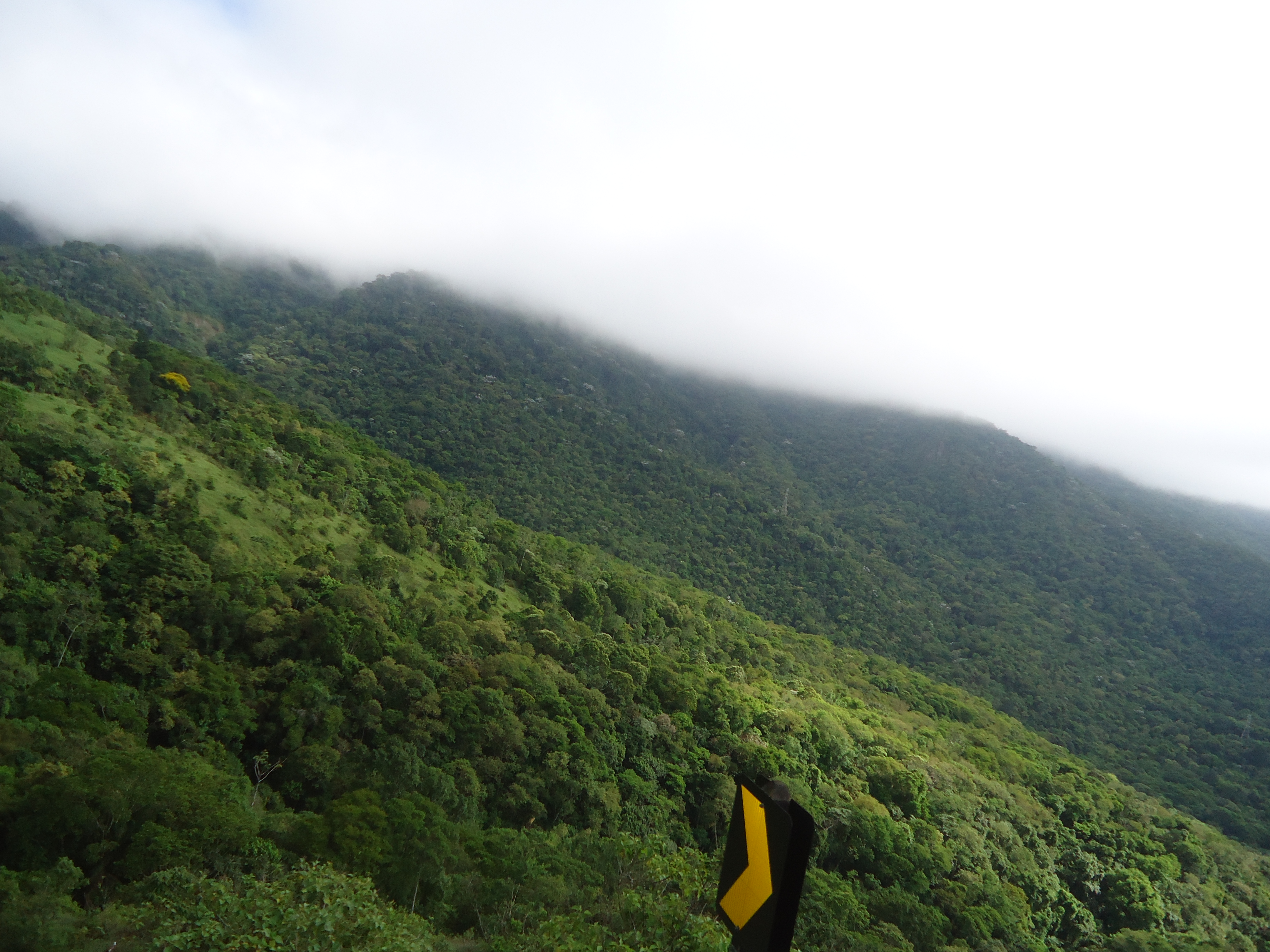 Mata Atlântica na Serra de Palmácia